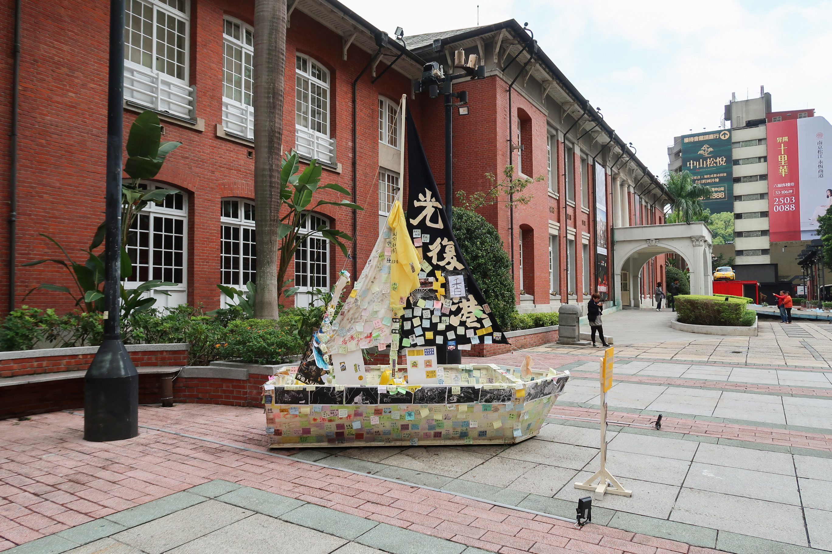 Lennon Boat in MOCA Taipei